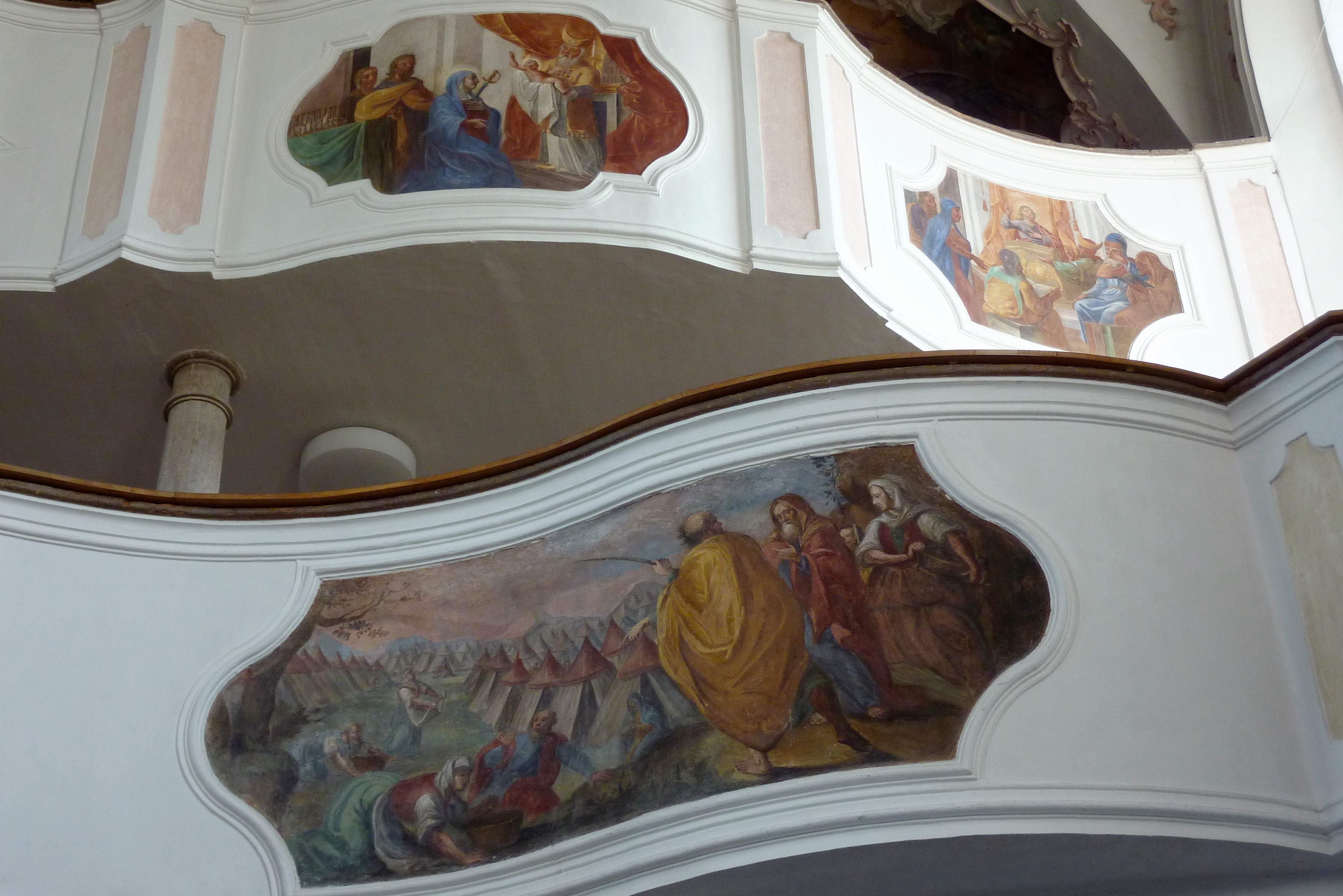 Katholische Pfarrkirche St. Peter in Tapfheim im Landkreis Donau-Ries (Bayern), Malerei auf der Emporenbrüstung, Darstellung: Mannasegen (unten)